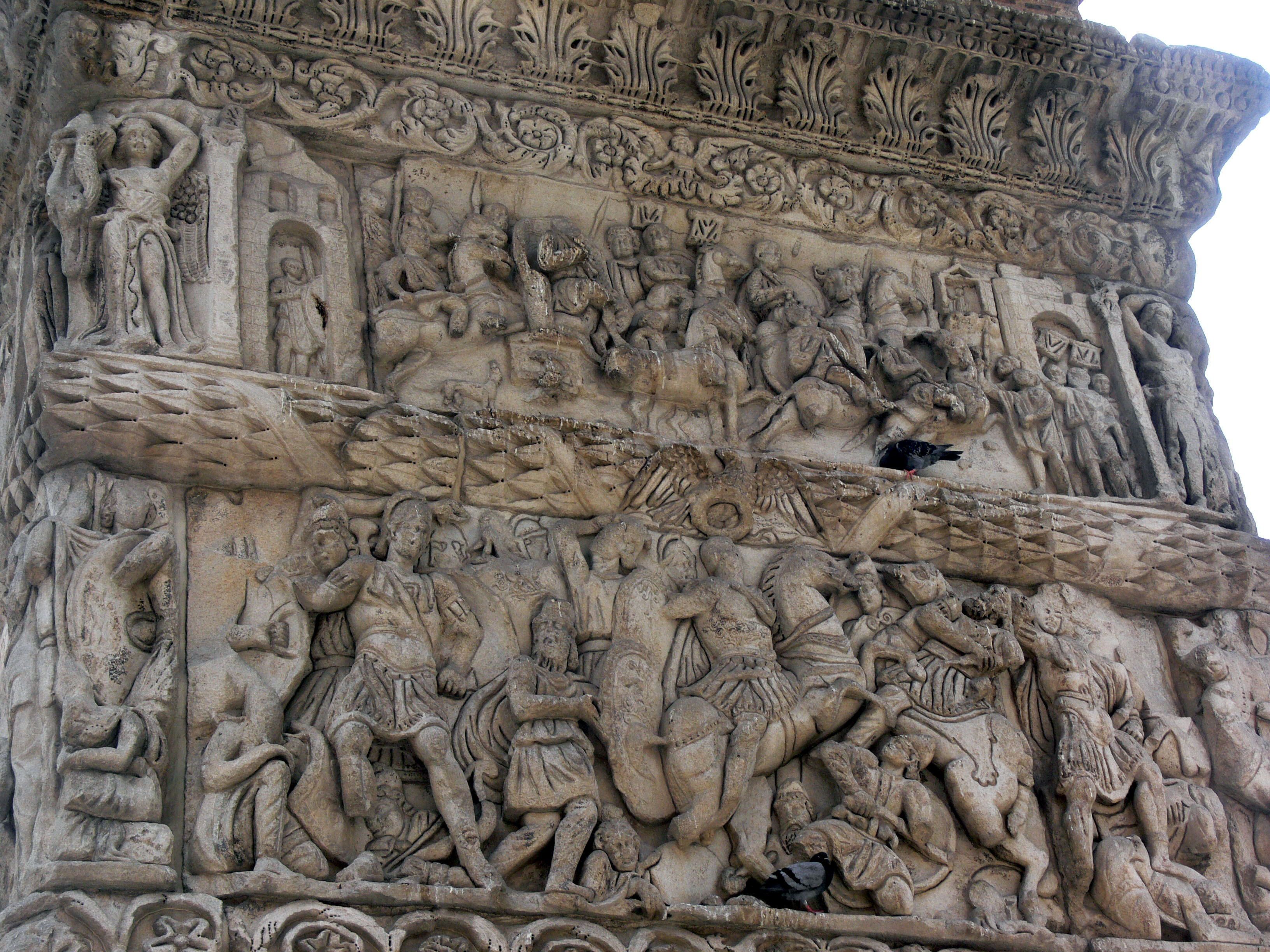 Tessaloniki. Galeriusbogen. Detail